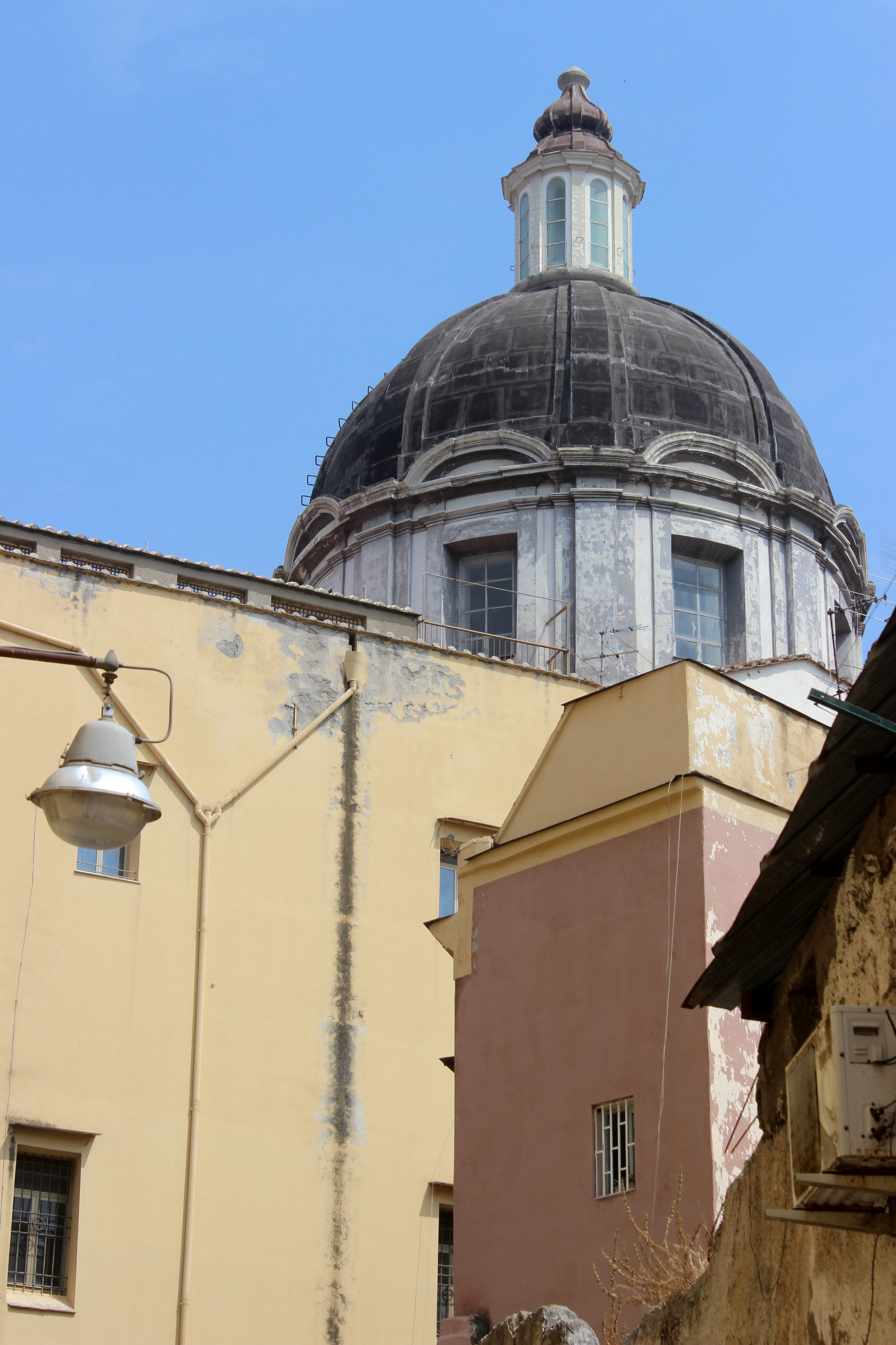 Nápoles. San Francesco degli Scarioni. Cúpula.